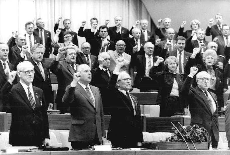 ADN-ZB/ Mittelstädt / 21.4.86 / Berlin: XI. Parteitag der SED - Abschluß Nach der Wiederwahl Erich Honeckers als Generalsekretär des ZK der SED sangen die Delegierten und Gäste des Parteitages zum Abschluß die "Internationale". Links Willi Stoph, Mitglied des Politbüros des ZK der SED und Vorsitzender des Ministerrates der DDR. 2.v.l. Michail Gorbatschow, Generalsekretär des ZK der KPdSU. [Erich Honecker] Rechts Horst Sindermann, Mitglied des Politbüros des ZK der SED und Präsident der Volkskammer der DDR.